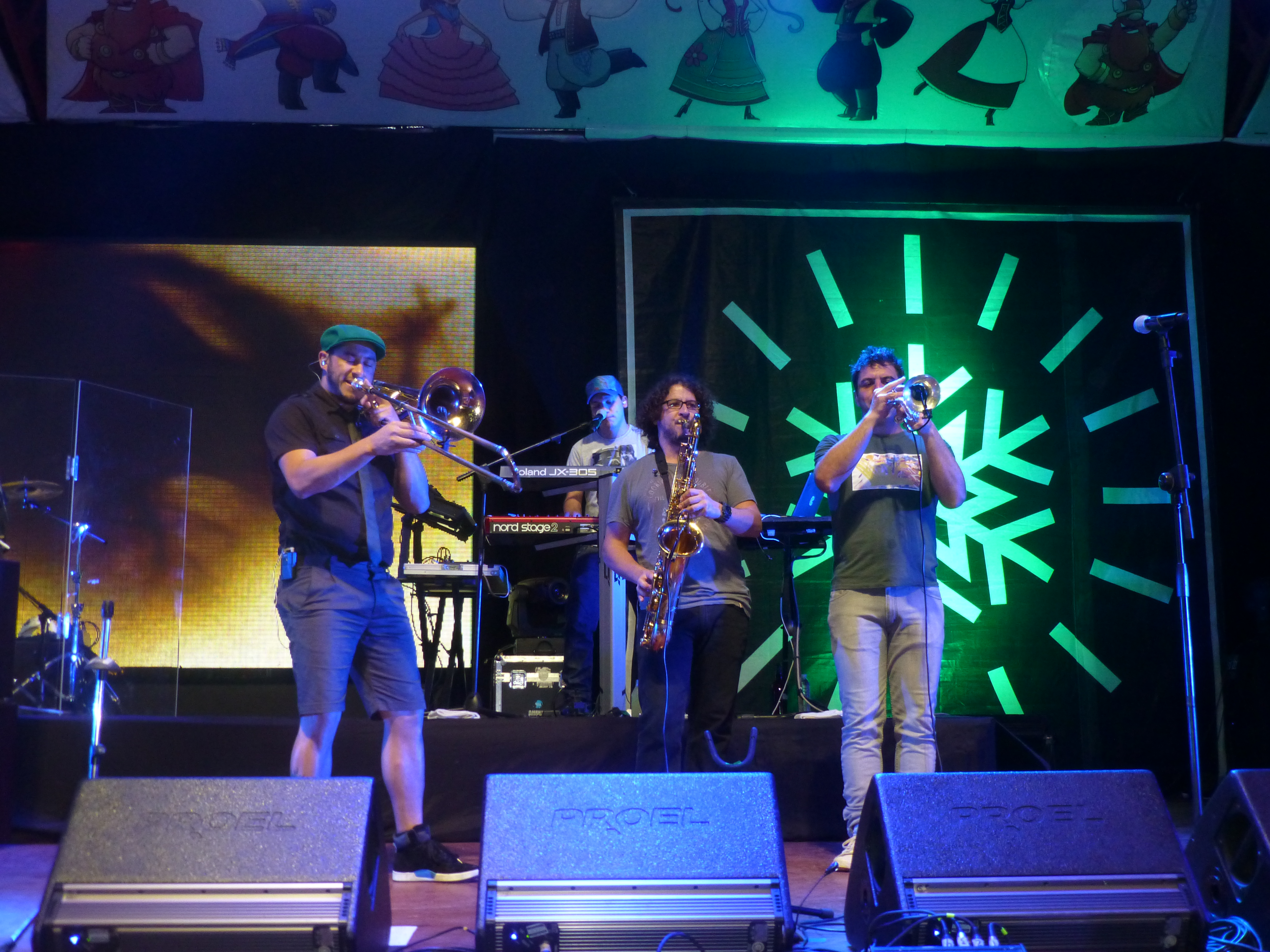 Concierto de No Te Va Gustar (NTVG) durante la XXXIV Fiesta Nacional del Inmigrante en la ciudad de Oberá, Misiones. Agradecimiento a la Federación de Colectividades por la gentileza de acreditar a Wikimedia Argentina como medio de prensa durante la realización de la Fiesta del Inmigrante.